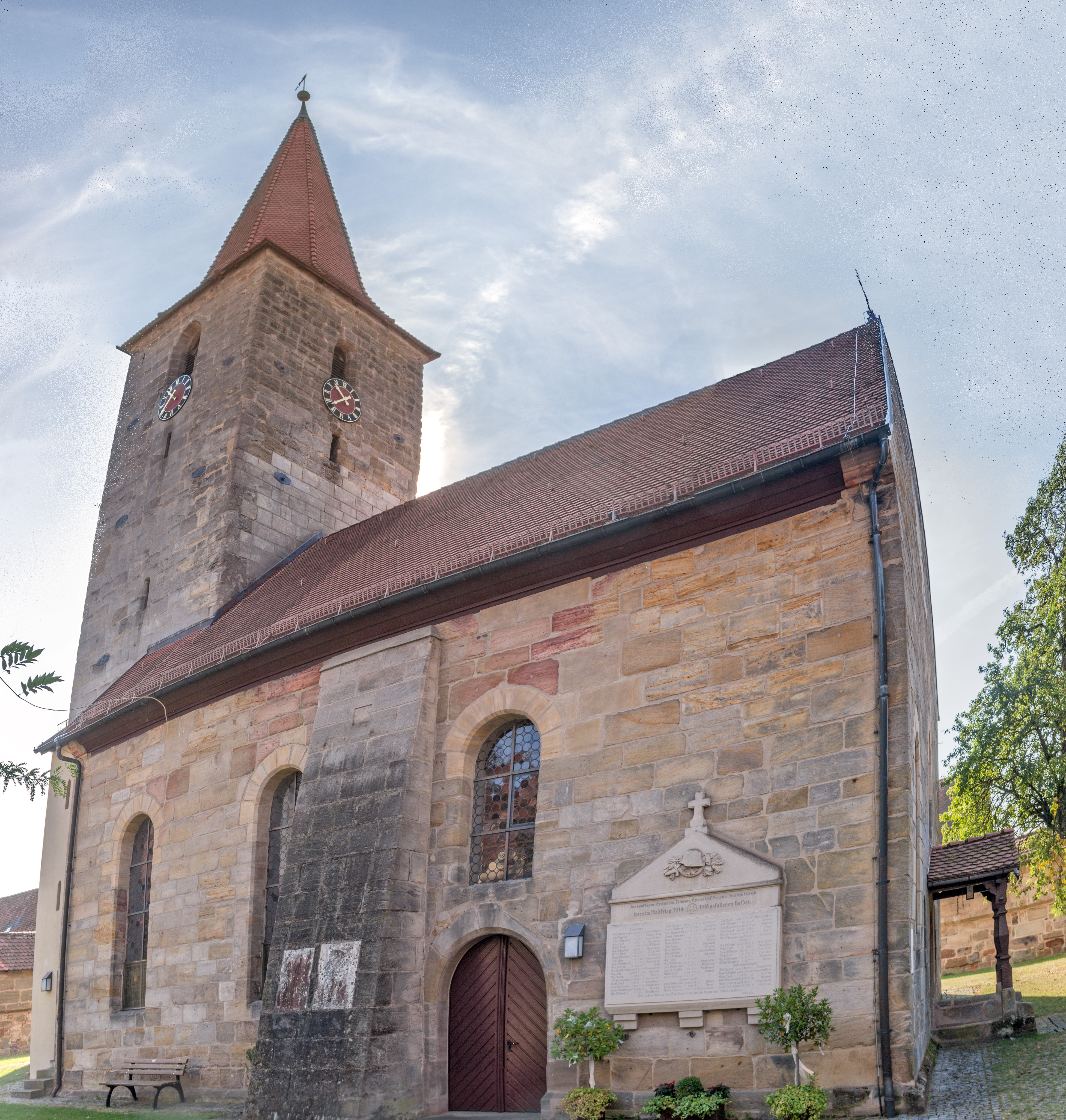 Evangelisch-lutherische Pfarrkirche St. Leonhard, LeinburgThis is a photograph of an architectural monument.